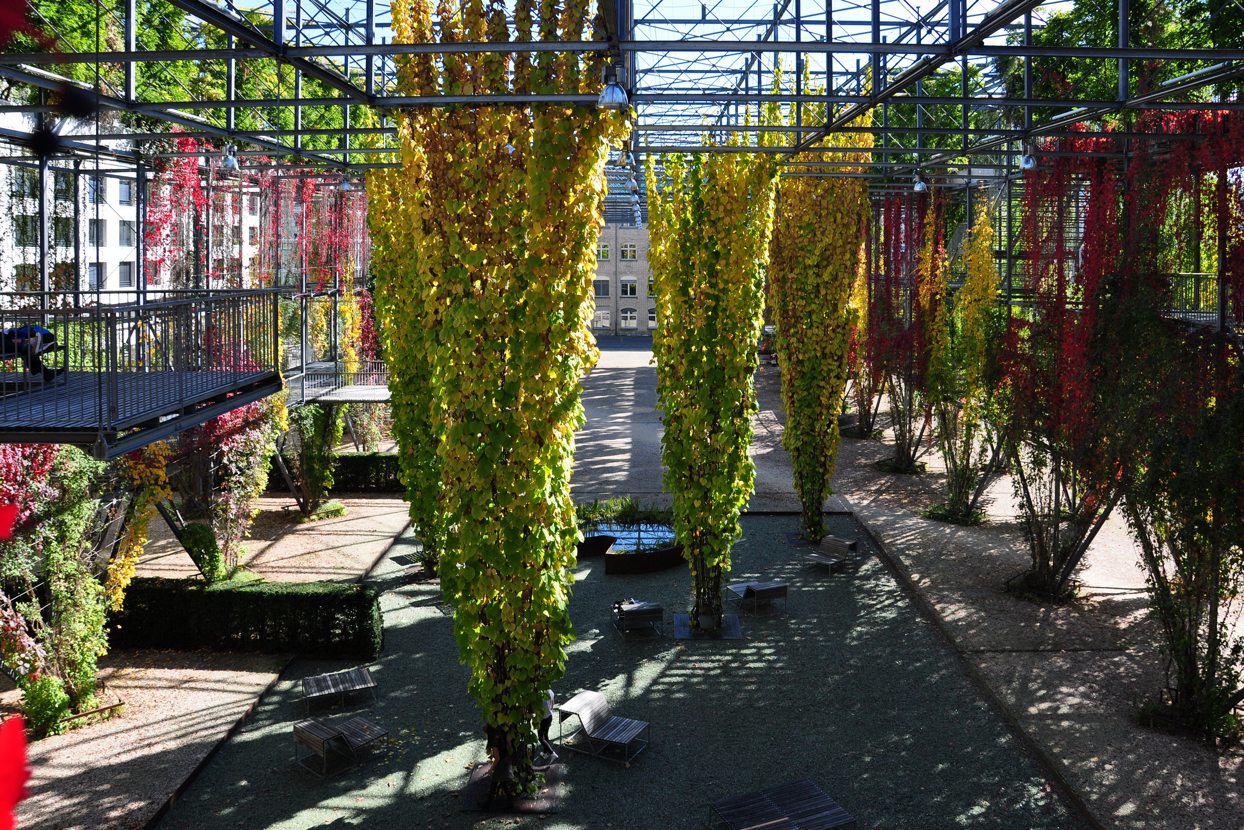 MFO-Park in Zürich-Oerlkon (Switzerland)